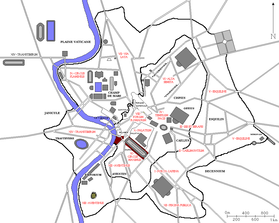 Plan de Rome avec la onzième région des 14 régions d'Auguste